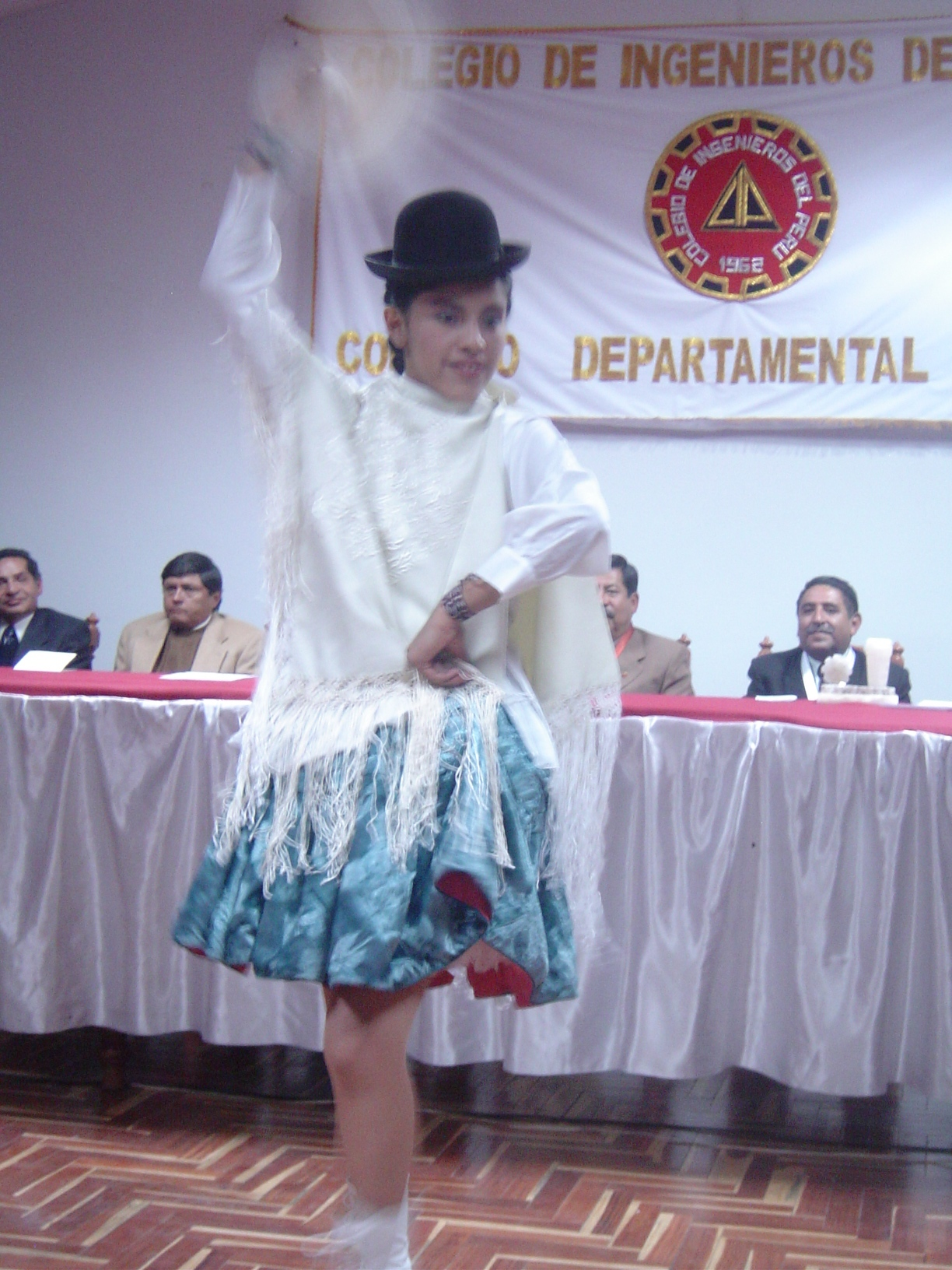 Cholita Puneña